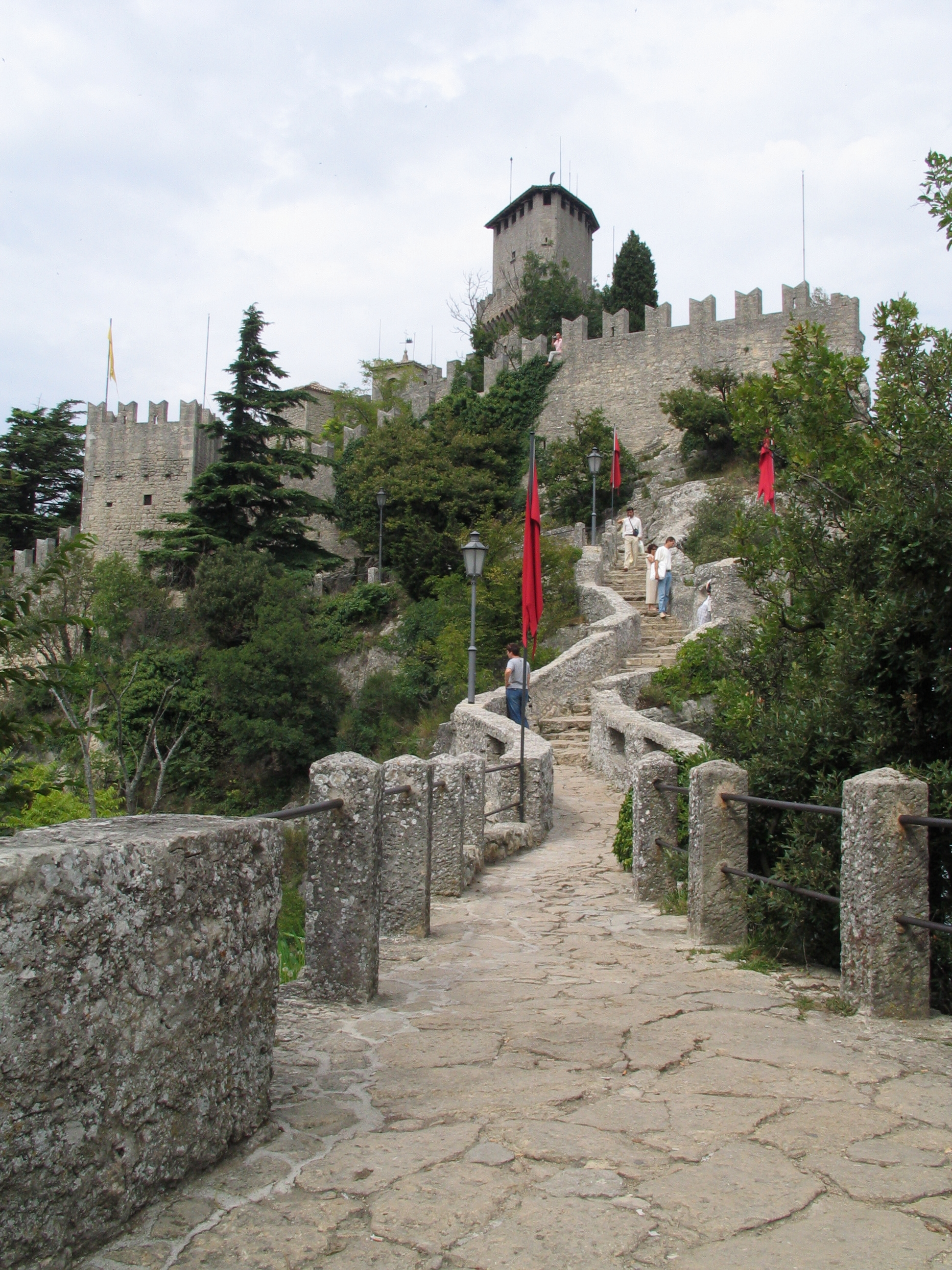 La Rocca o Guaita, San Marino, 1. Turm auf dem Monte Titano